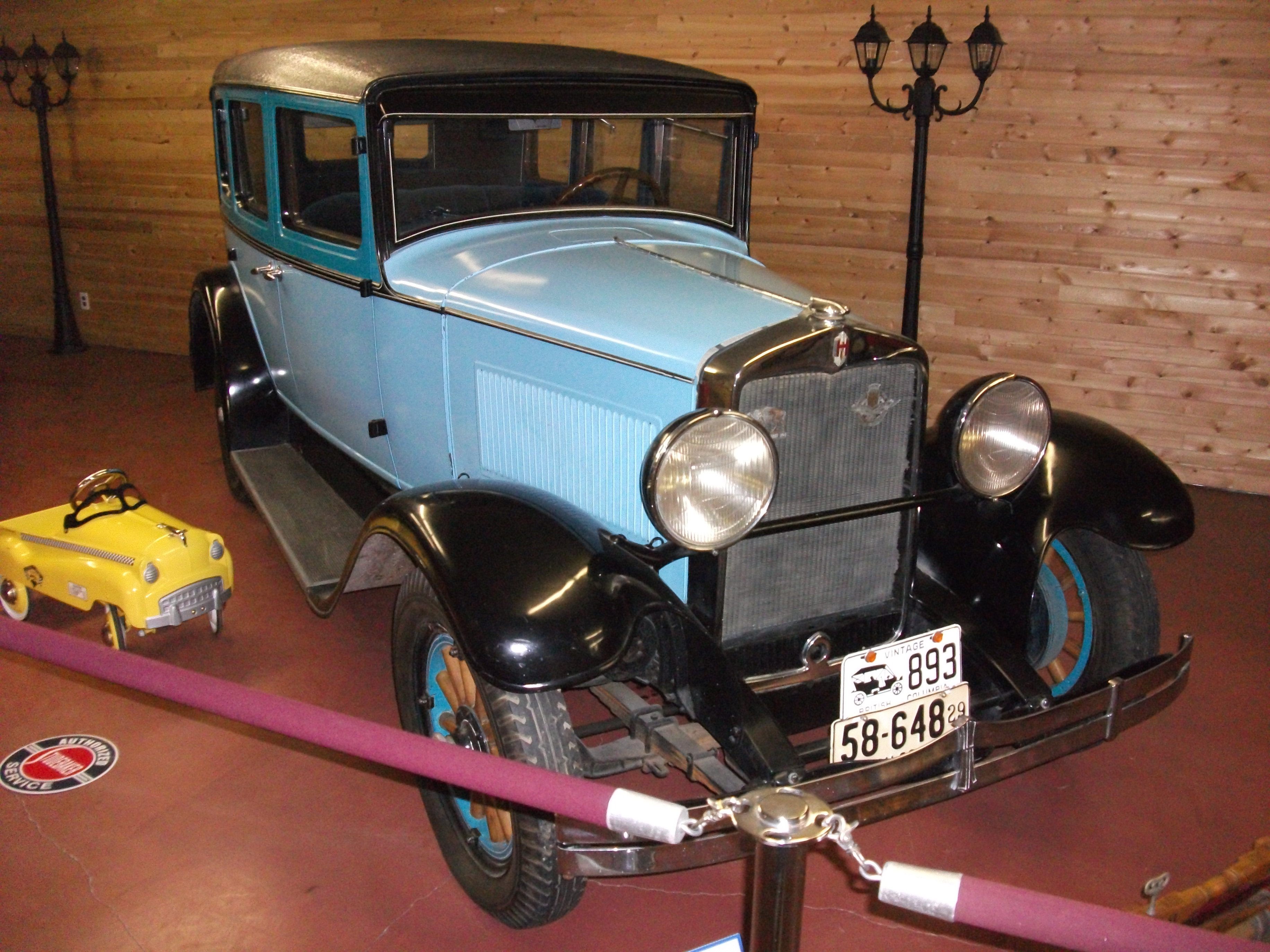 1929 Huppmobile Series A